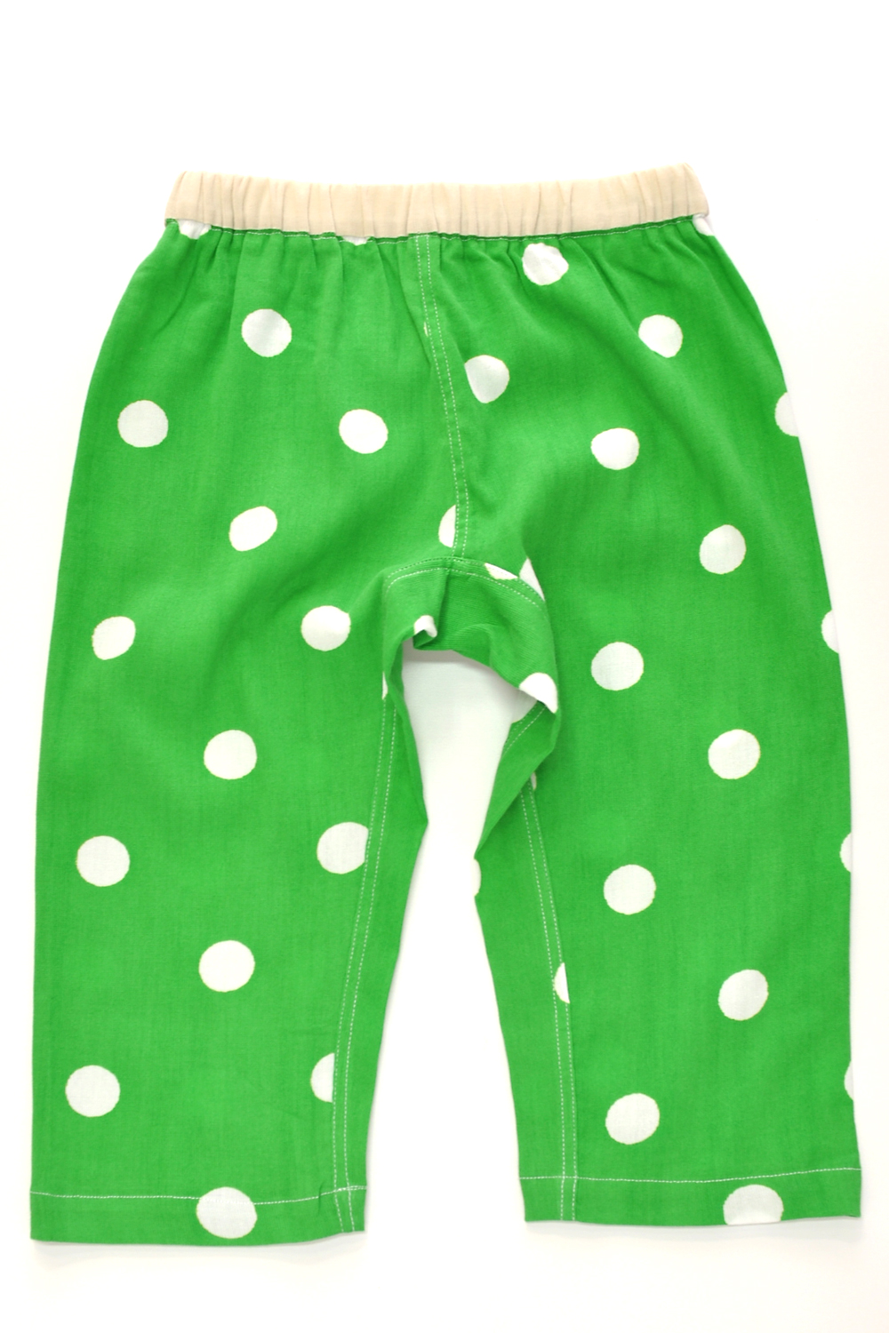 日本の蒸し暑い夏を過ごすには快適な すててこ は、汗取りとしての用途だけでなく、お洒落着としても注目されている。